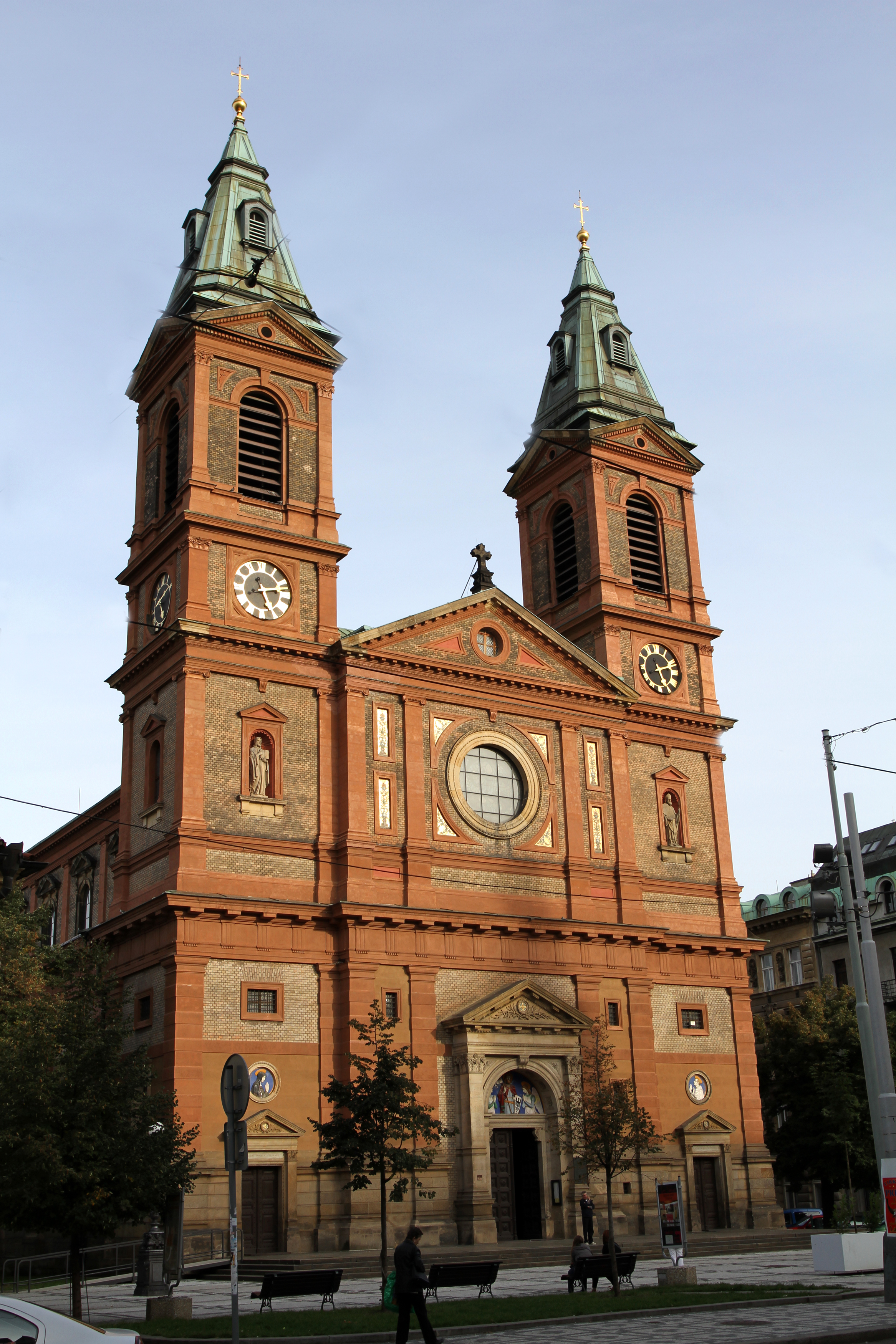 Kostel svatého Václava na Smíchově, Praha 5-Smíchov, Štefánikova